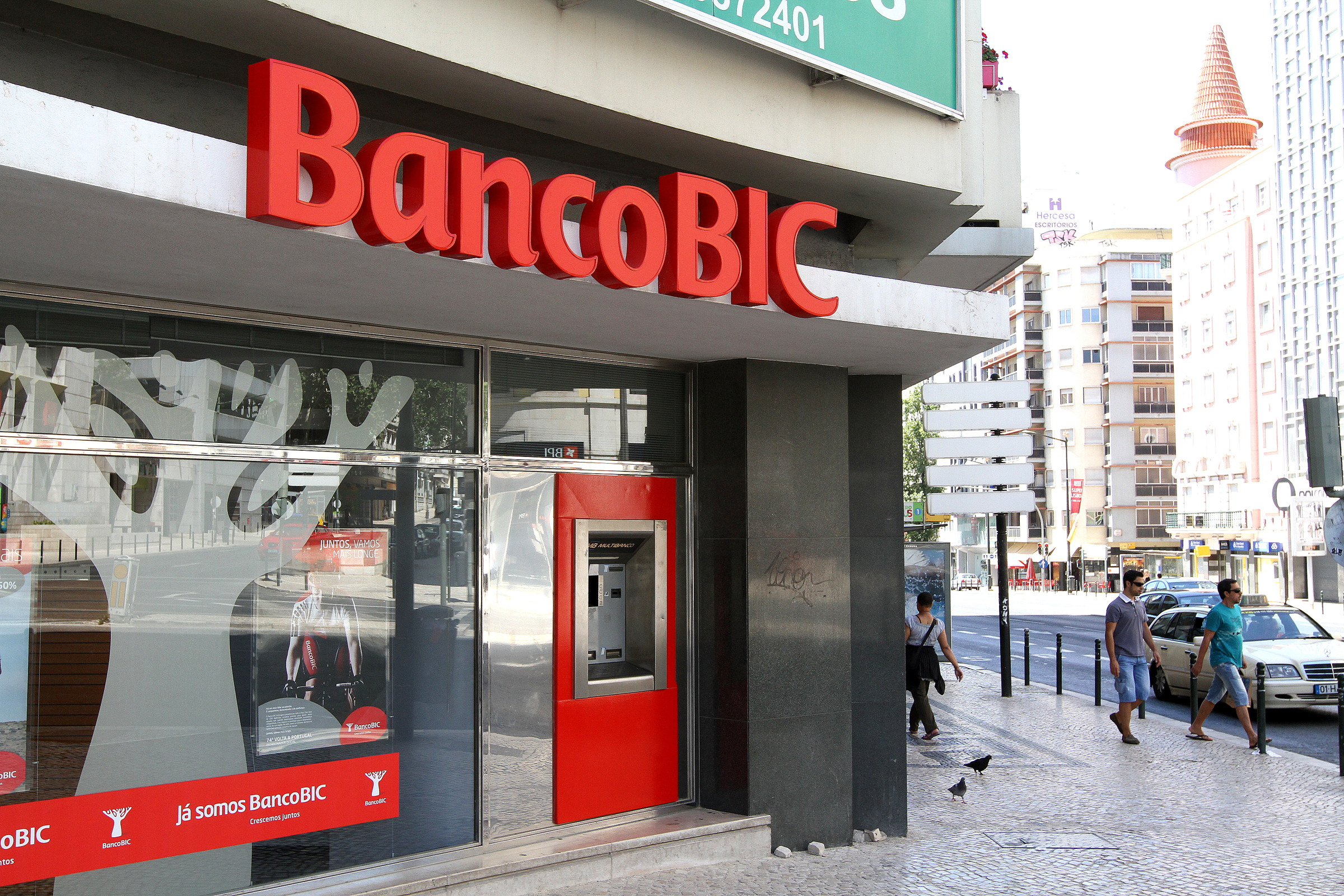 Branch of Banco BIC Portugues in Lisbon, Saldanha.